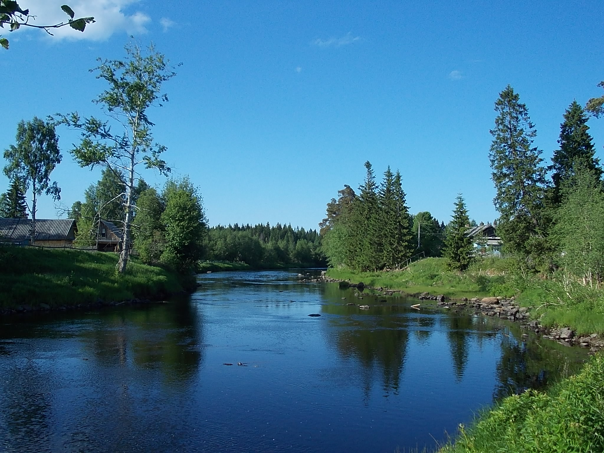 Река Ивина